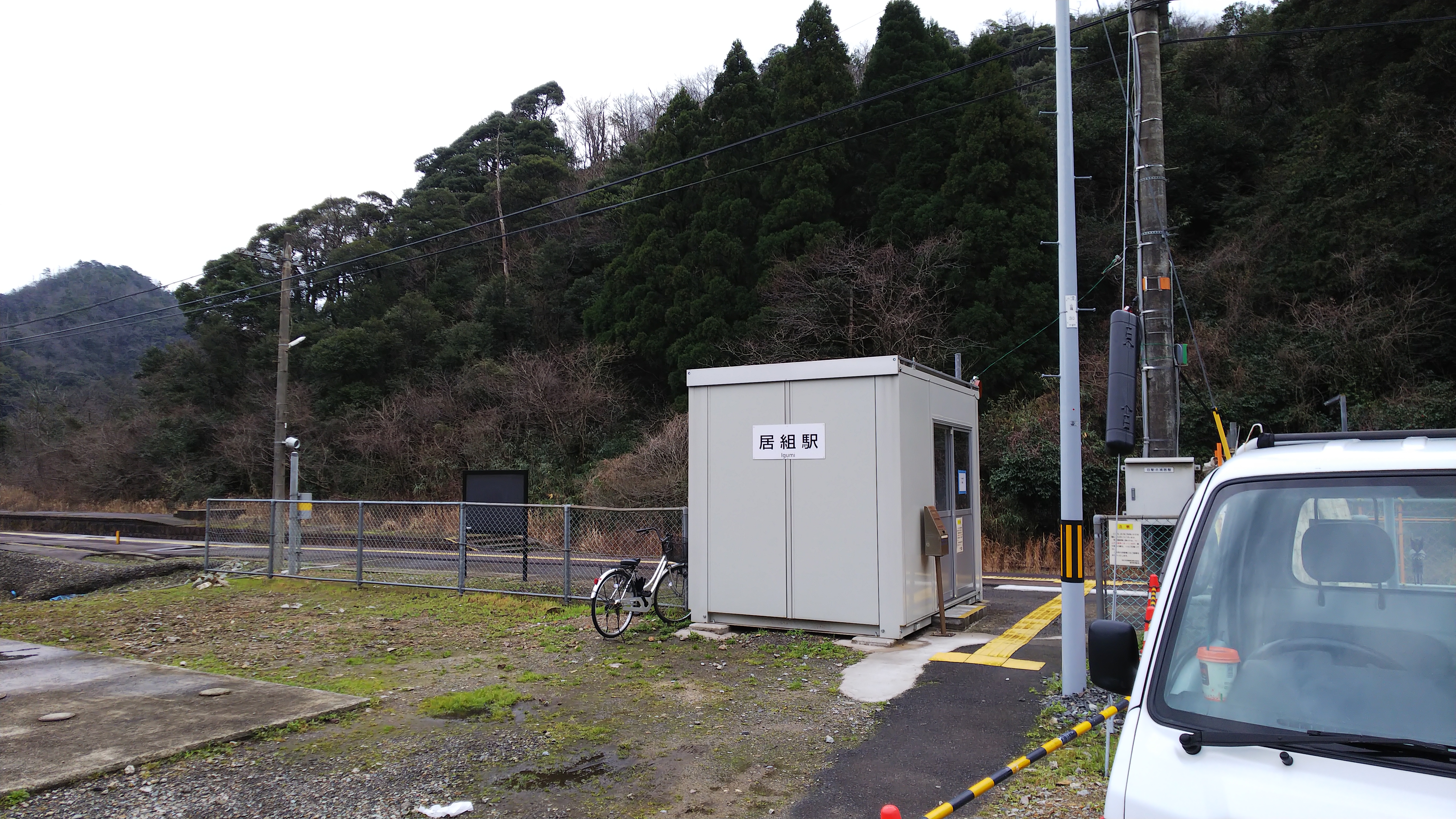 新築中の居組駅の仮駅舎。2019年3月12日居組駅にて撮影